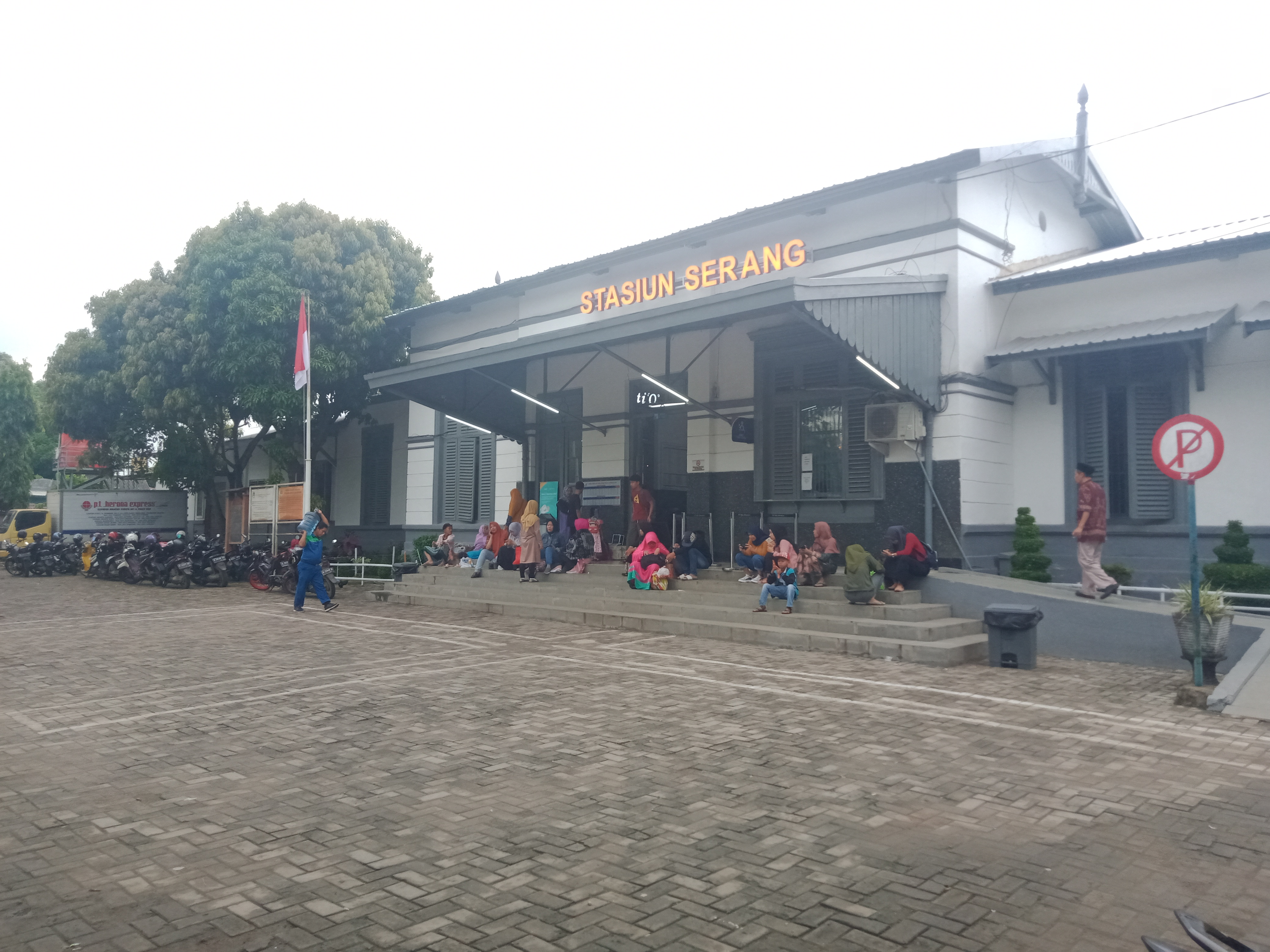 Stasiun Serang, 2020